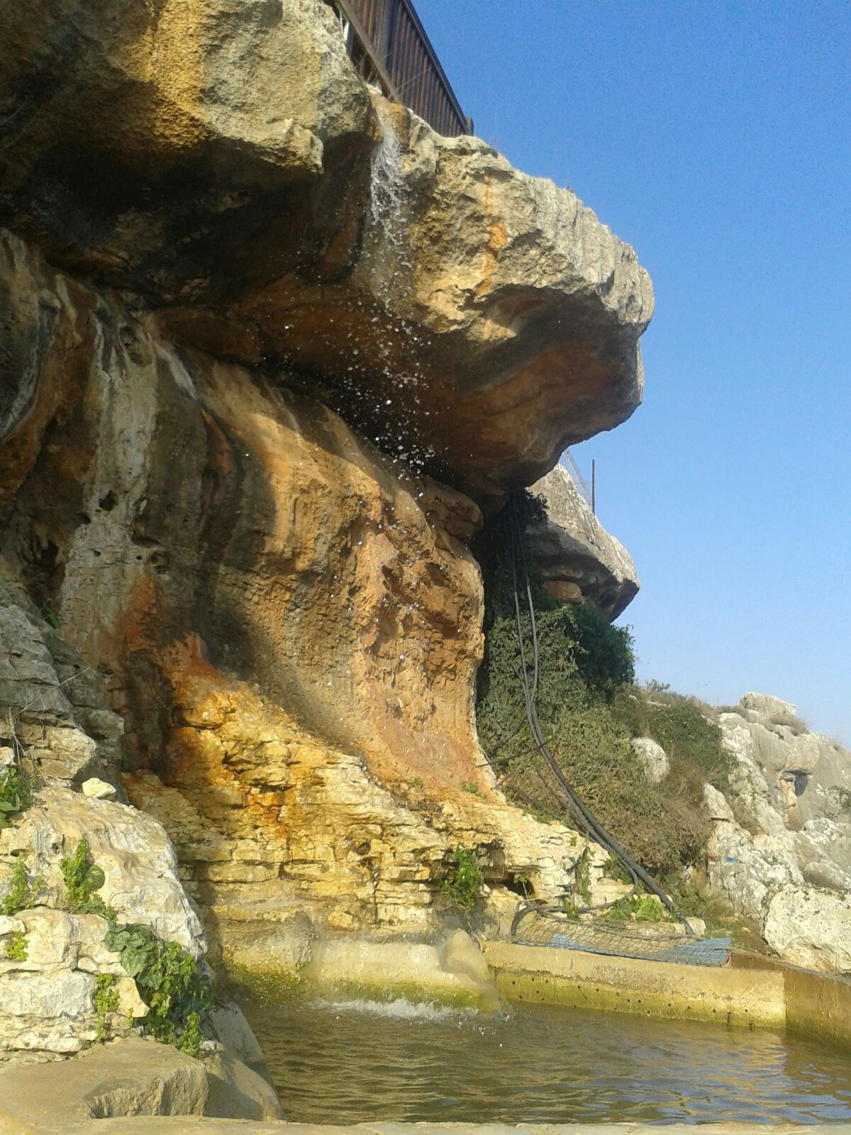 אחד הצנירים בפארק הצנירים, למרגלותיו בריכה מלאכותית.